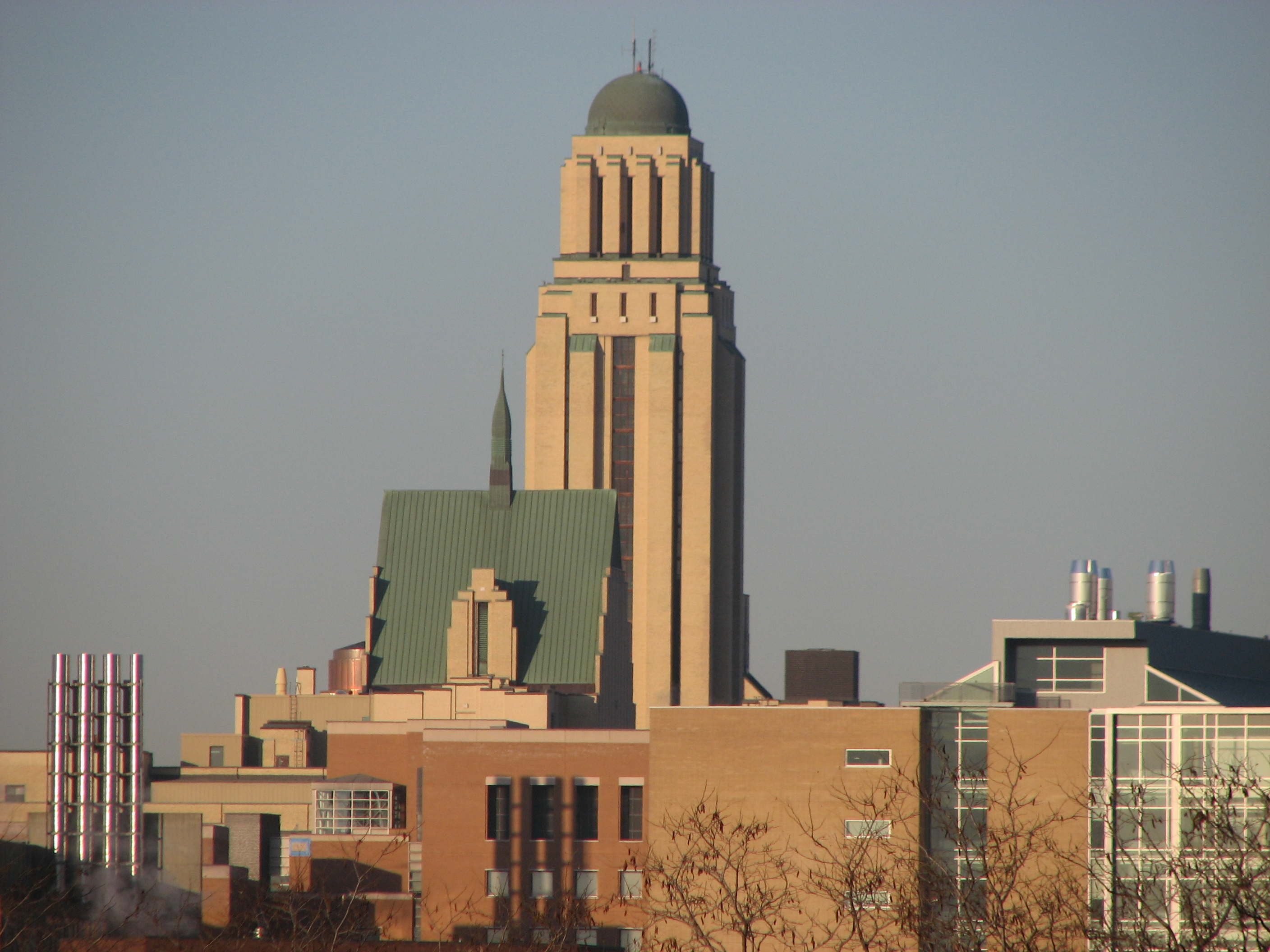 Tour de l'université de Montréal, œuvre d'Ernest Cormier